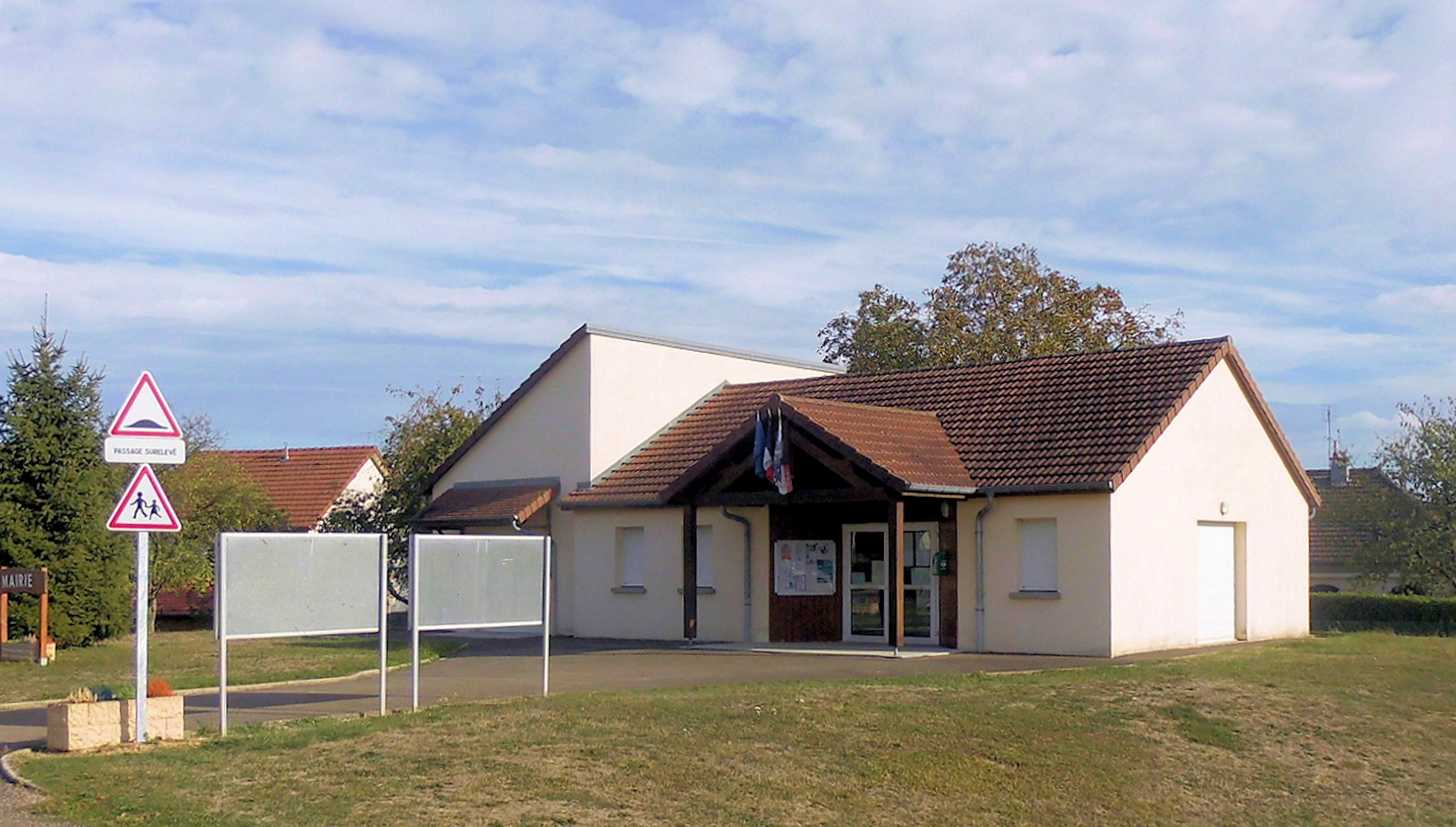 La mairie de Charmoille